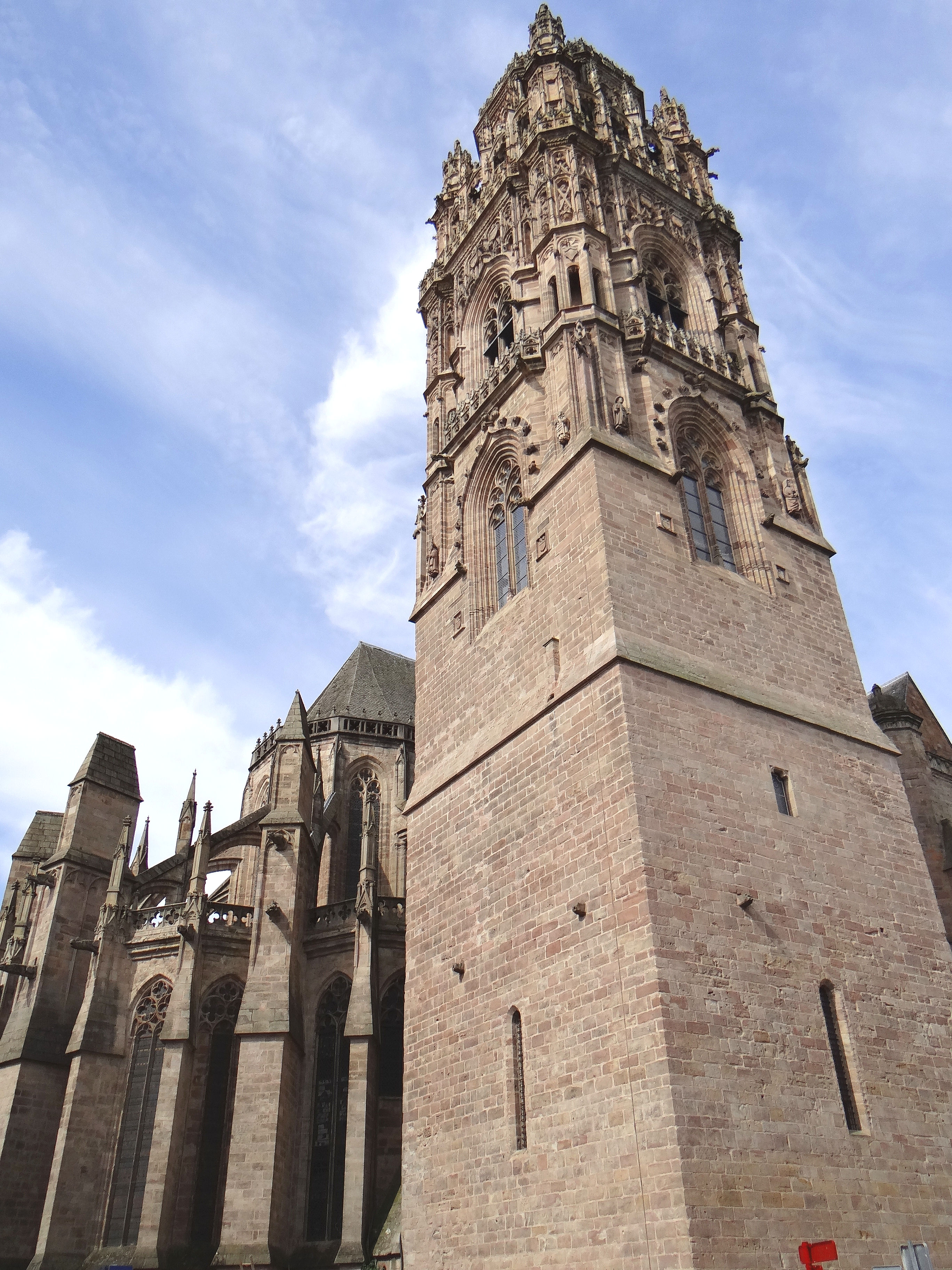 Rodez - Cathédrale Notre-Dame - Clocher